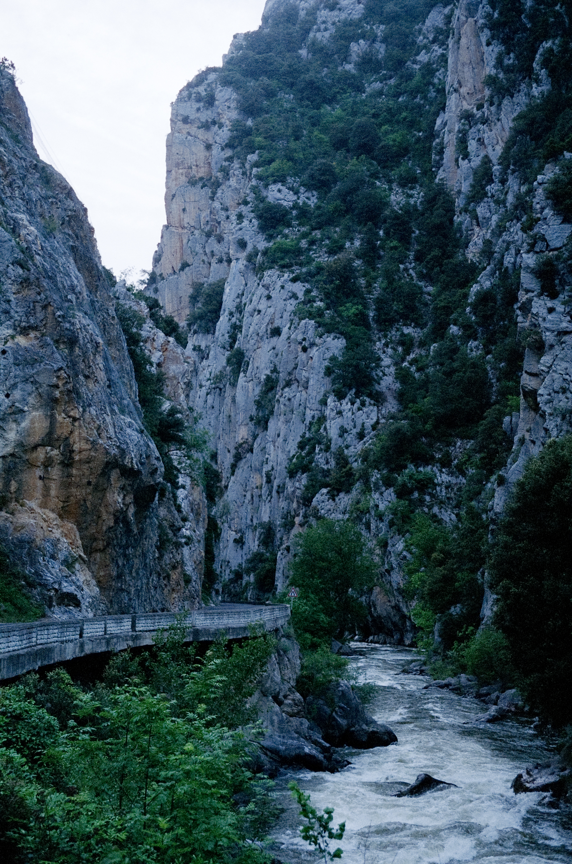 Défilé de la Pierre-Lys, Aude, France